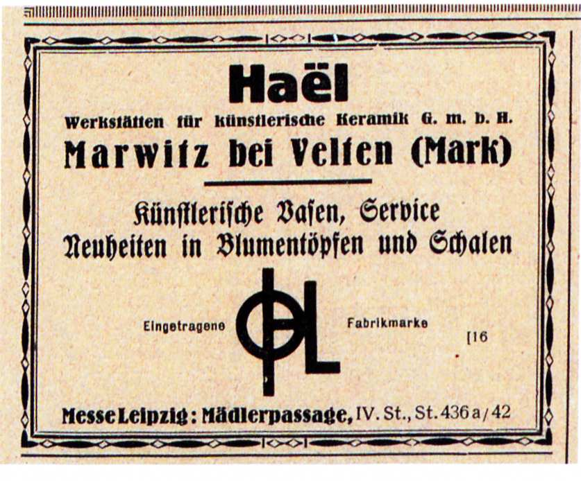 Haël-Werkstätten für Künstlerische Keramik Werbeanzeige Leipziger Messe 1927 in der Fachzeitschrift Die Porzellan- und Glashandlung, 29, 9. Juli 1927, S. 1037